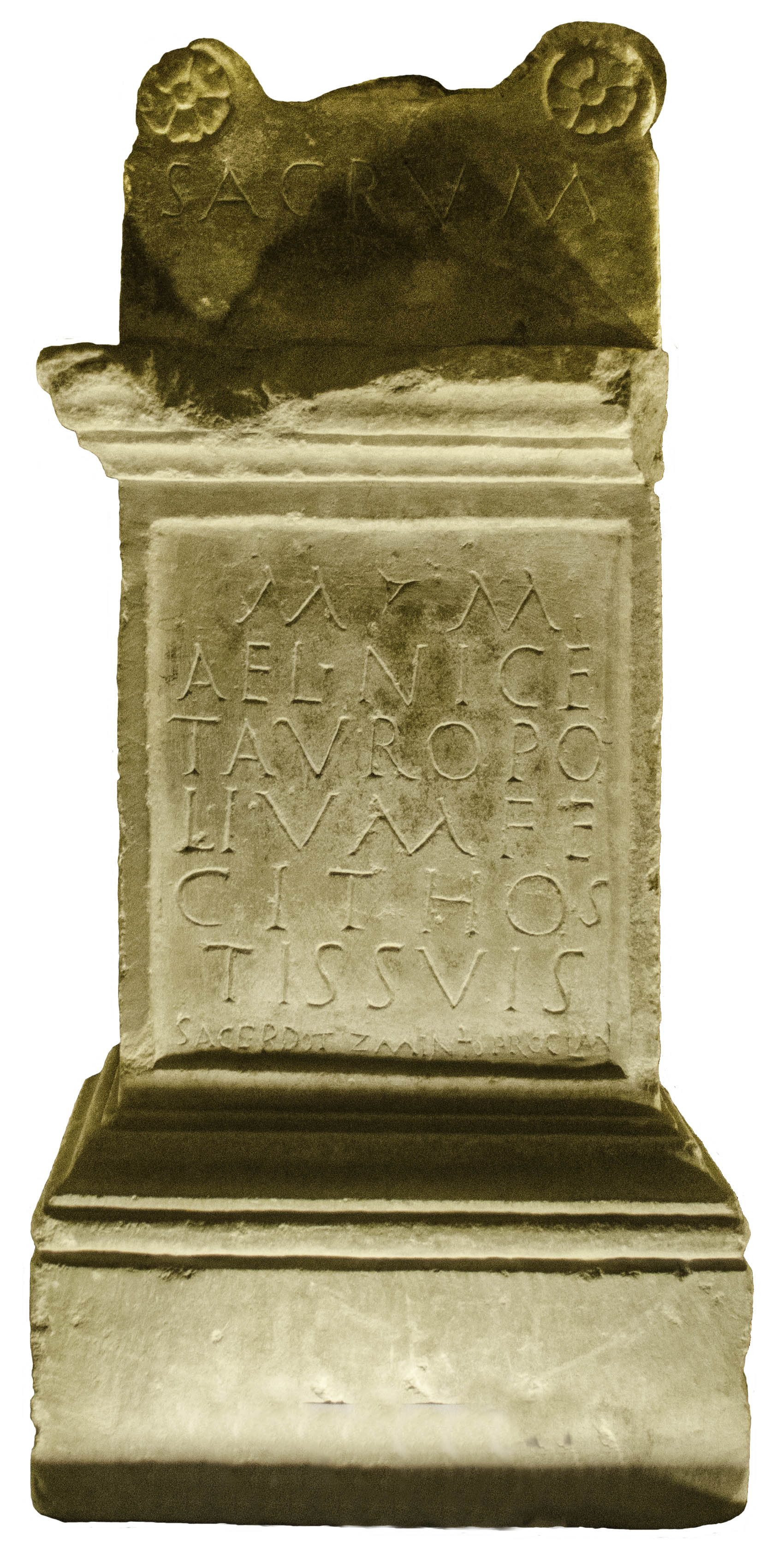 Autel taurobolique d’Aelia Nice. Musée Eugène-Camoreyt de Lectoure, Gers, France.